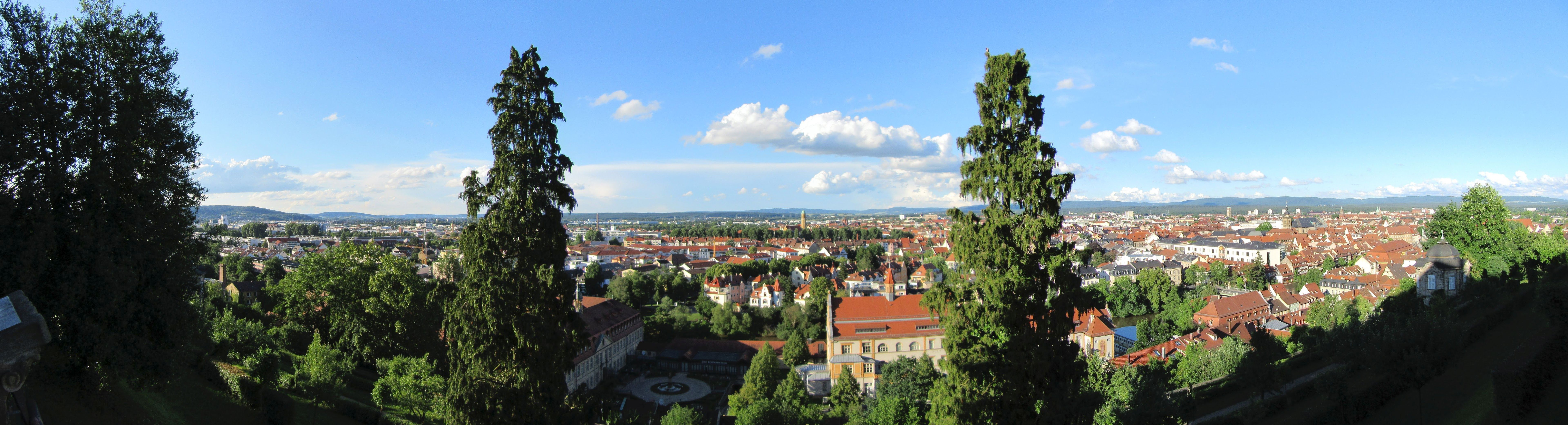 Blick auf Bamberg vom Rosengarten/Michaelsberg